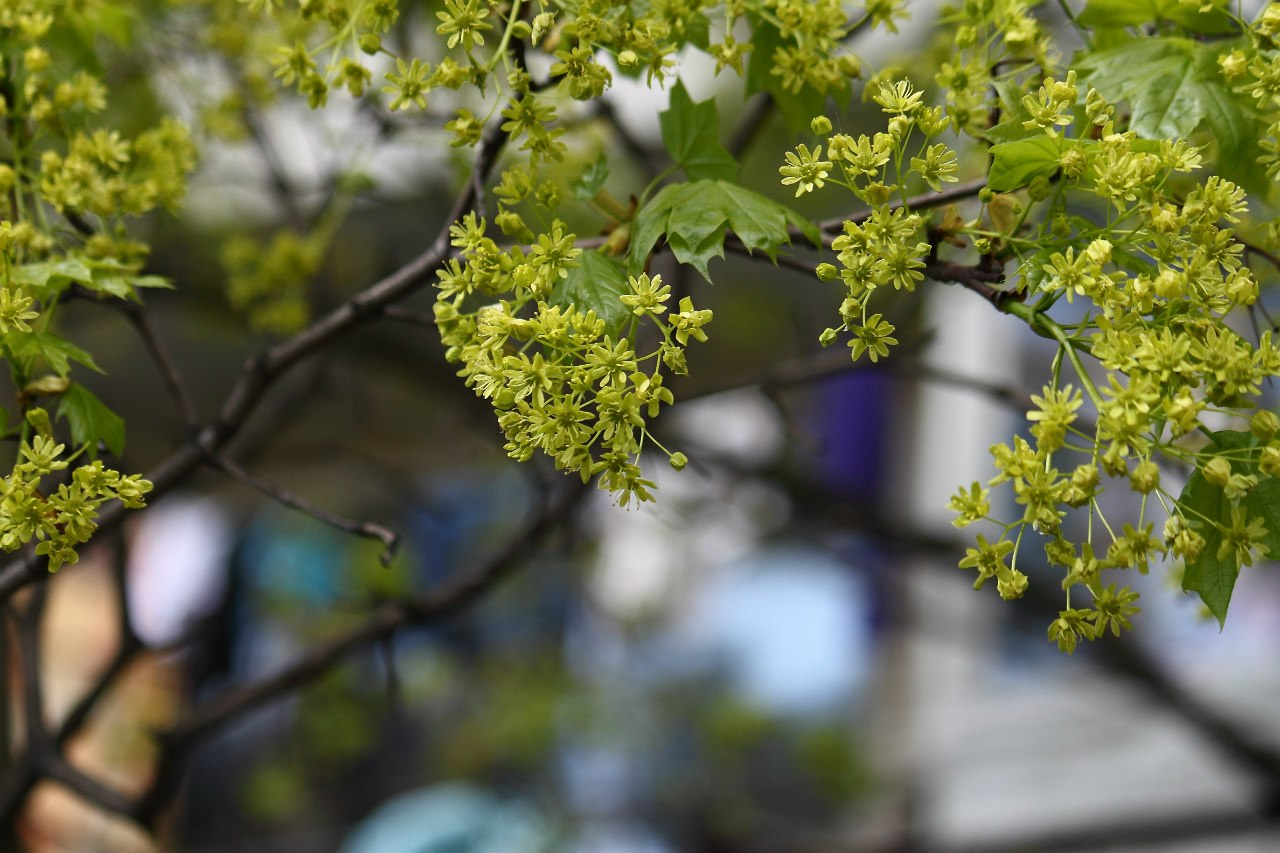 Klen (Acer) - tree's flowers in St.Petersburg